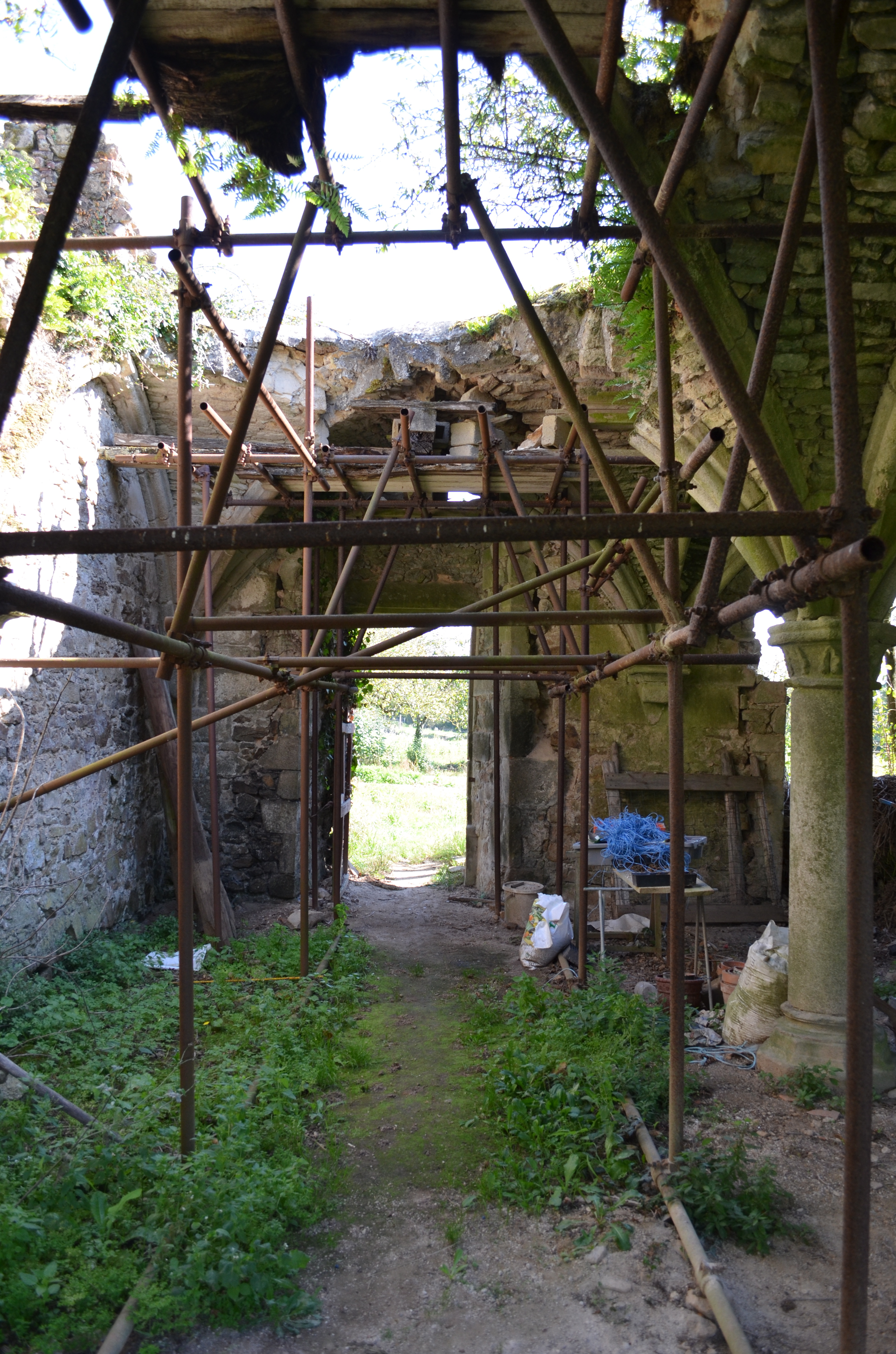 Ancienne abbaye des Fontenelles (13e s. ; 15e s.) - Saint André D'Ornay, La Roche-sur-Yon .